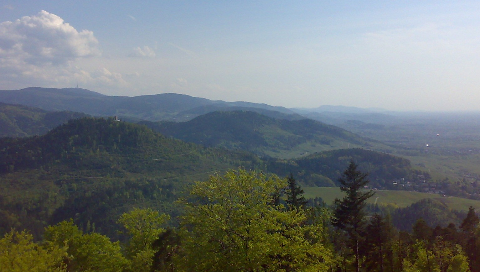 Blick vom Fremersberg auf Yburg und Nordschwarzwald